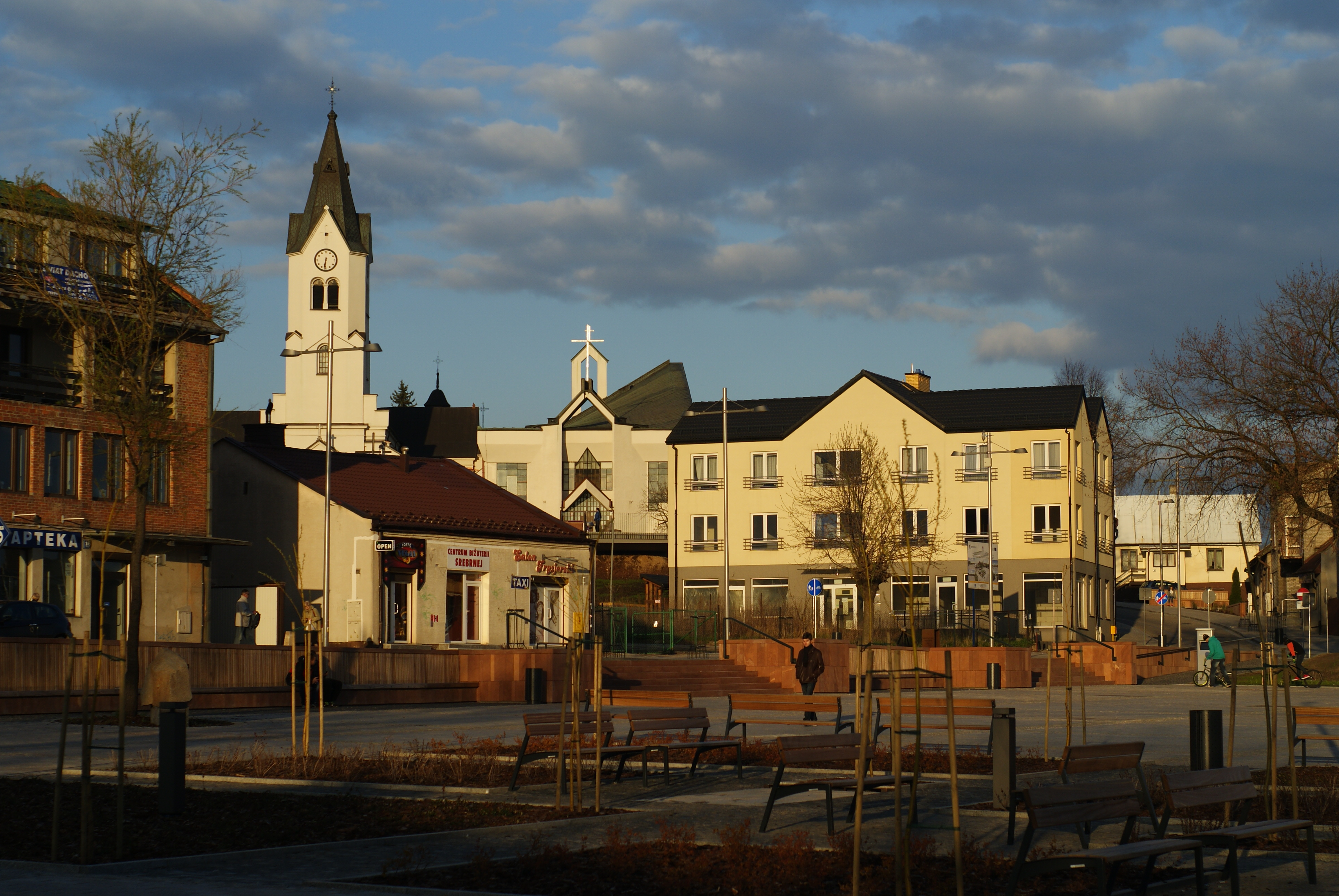 Rynek w Wierzbniku